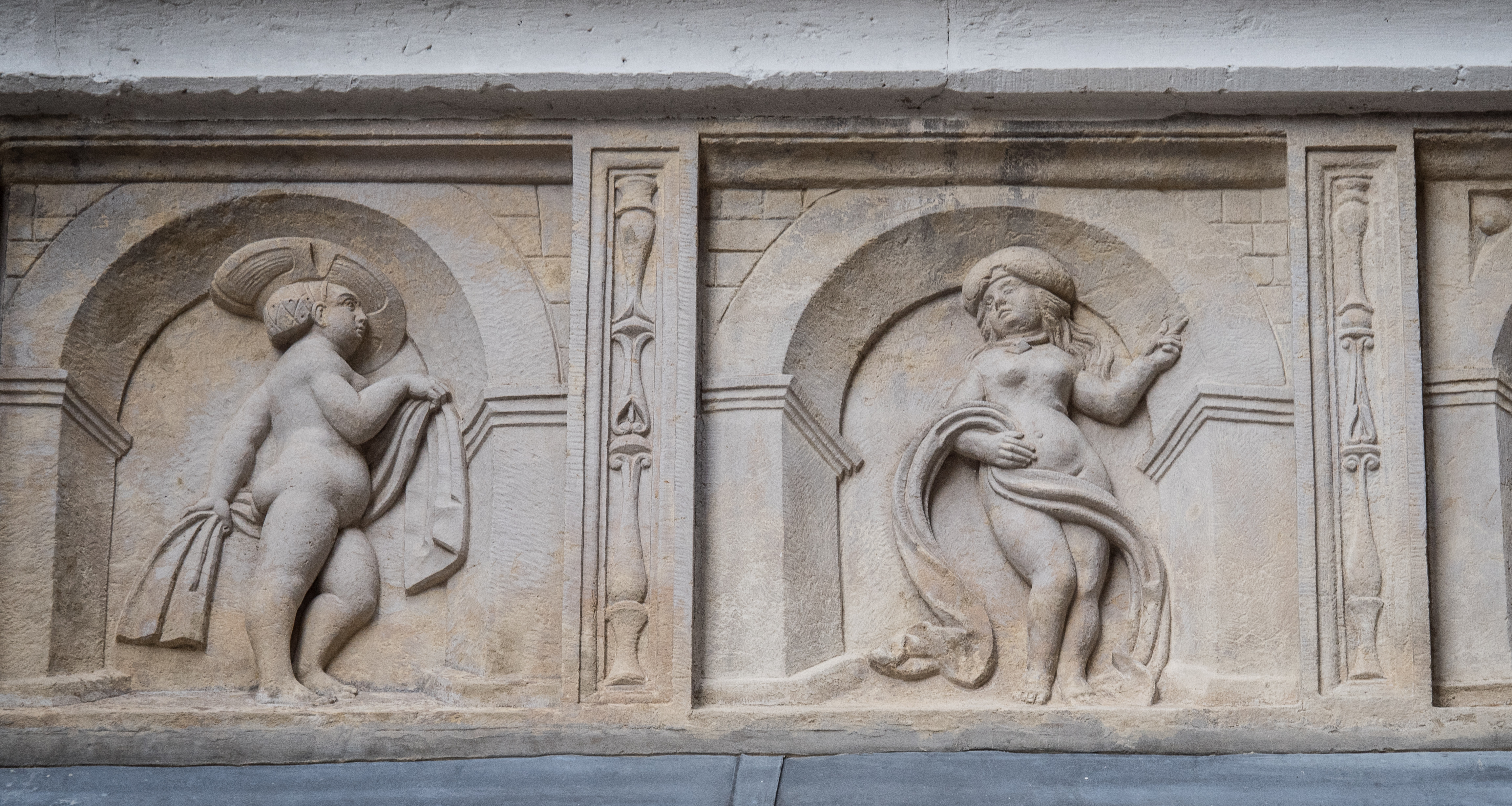 Antikisierende Reliefs am Großen Wendelstein der Albrechtsburg in Meißen, 1524 von dem Bildhauer Christoph Walther I ausgeführt